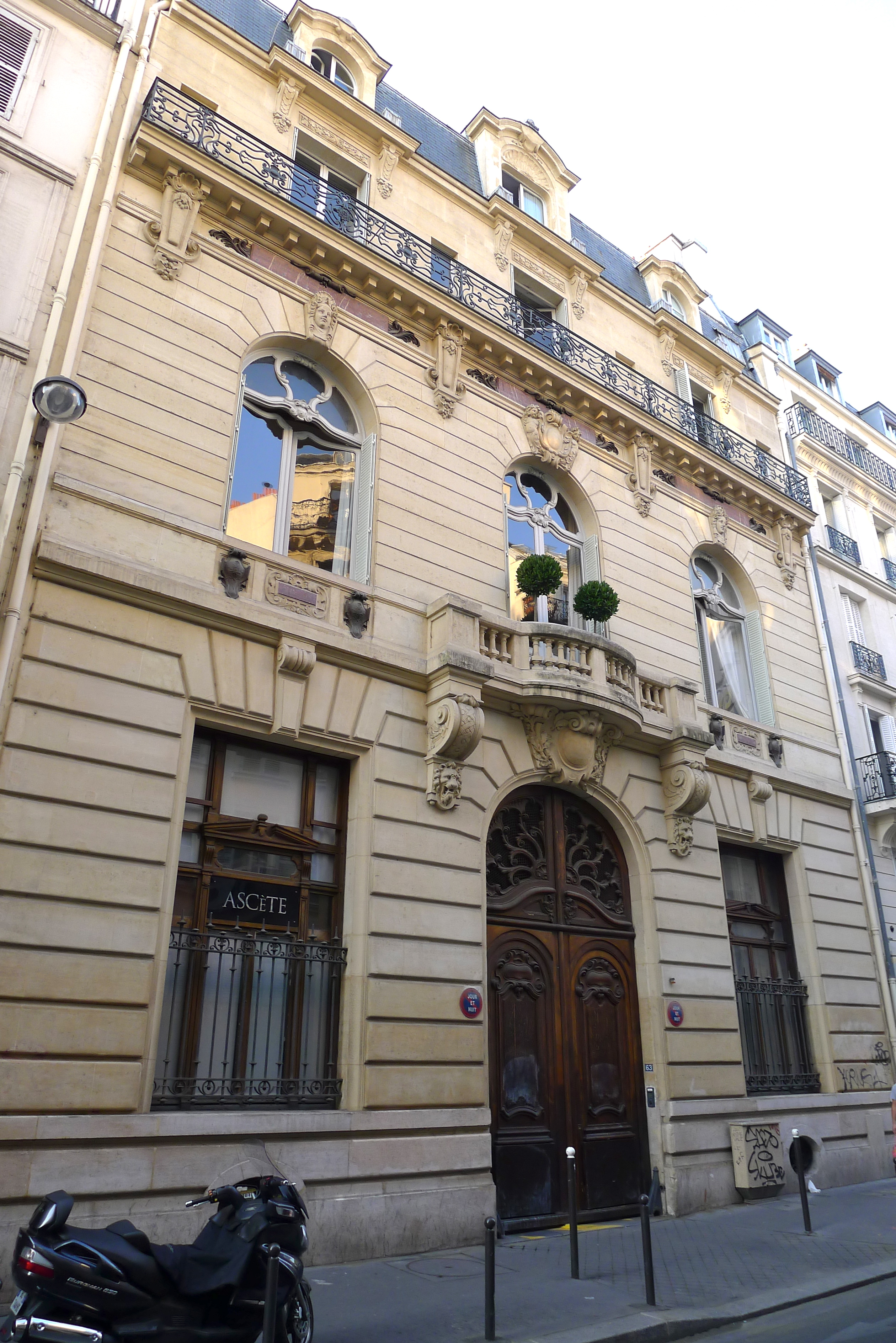 Hôtel Leblanc-Barbedienne, 63 rue de Lancry, 75010 Paris (monument historique)